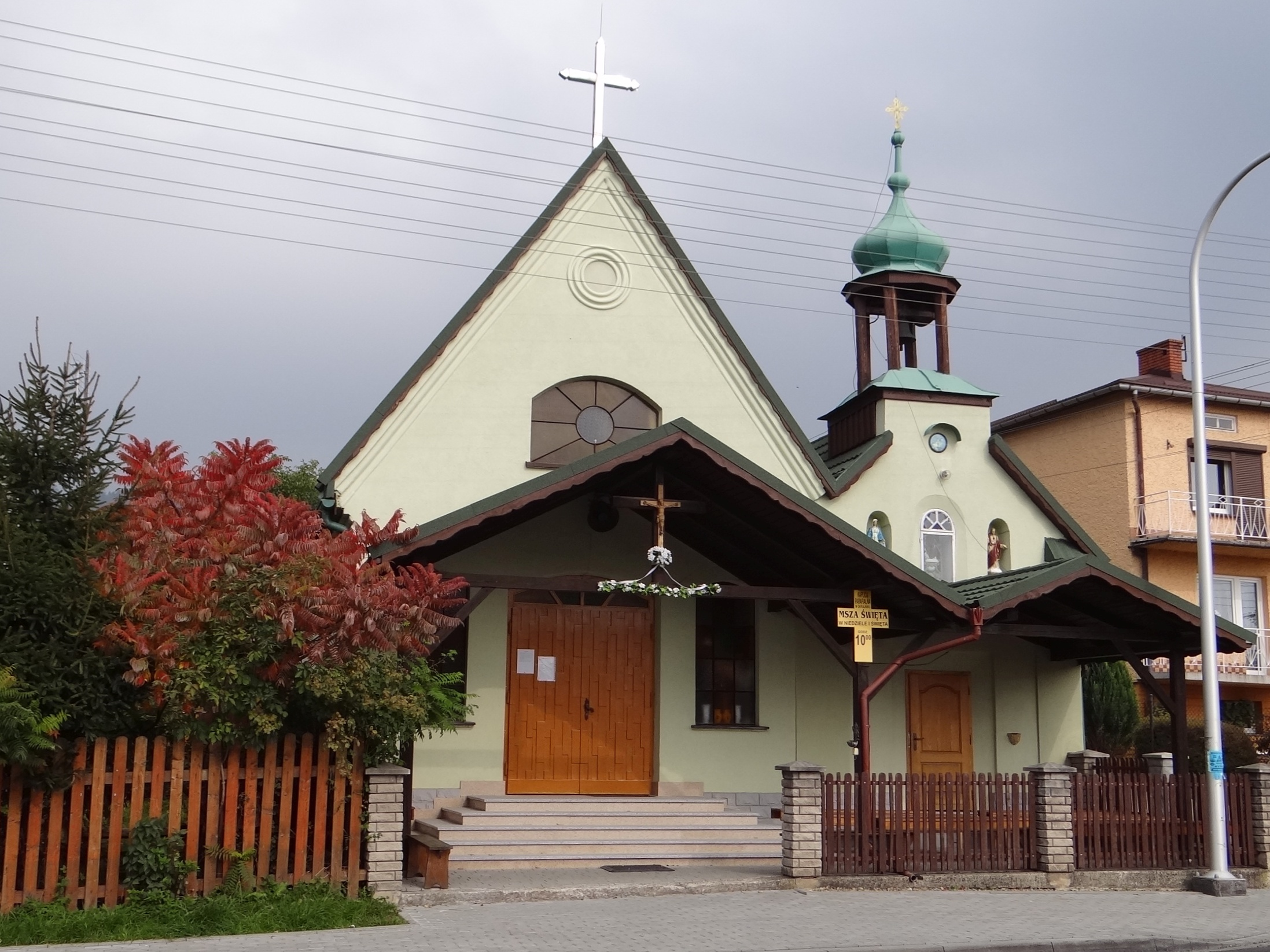 Kaplica Matki Boskiej Różańcowej w Okrajniku